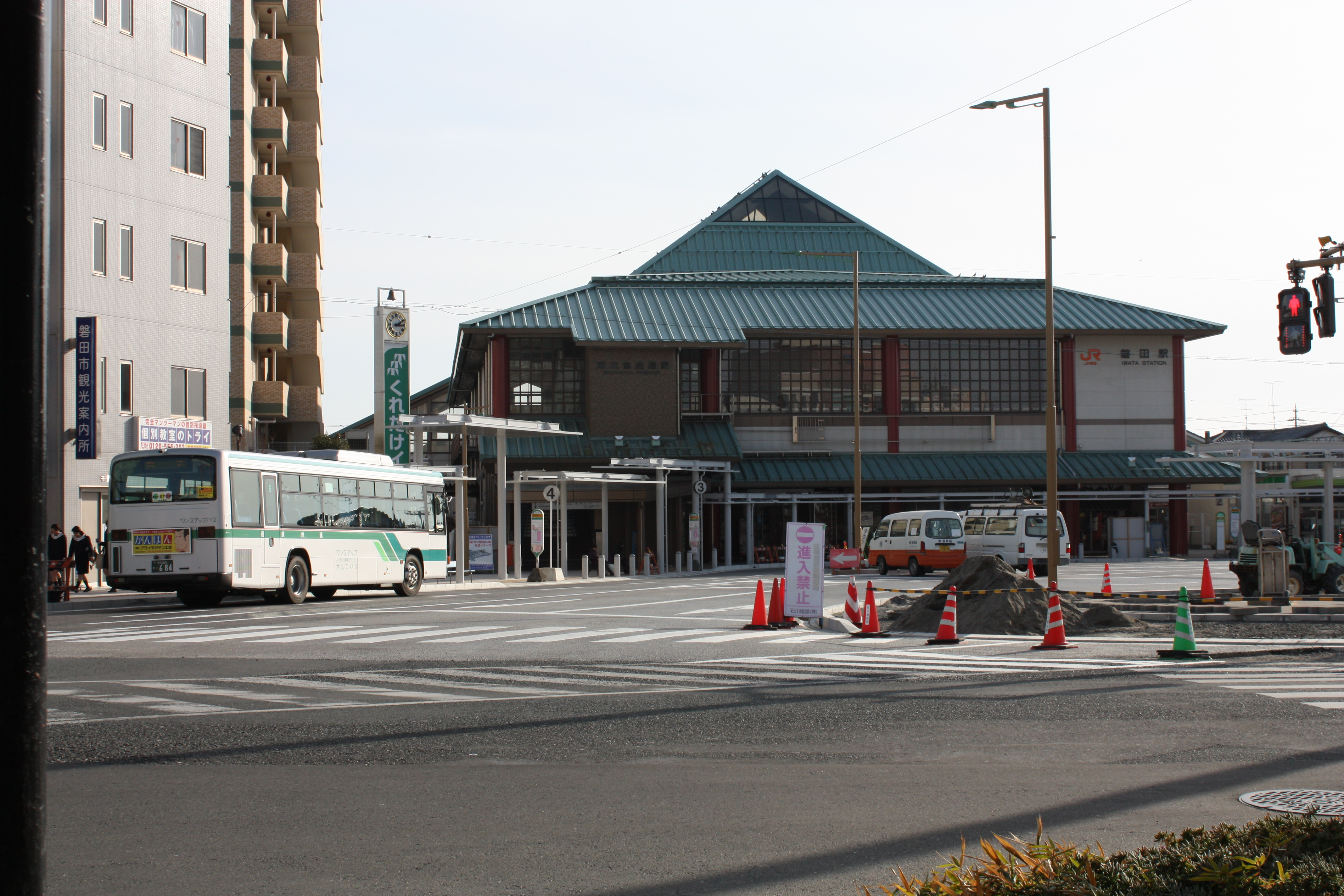 磐田駅 北口